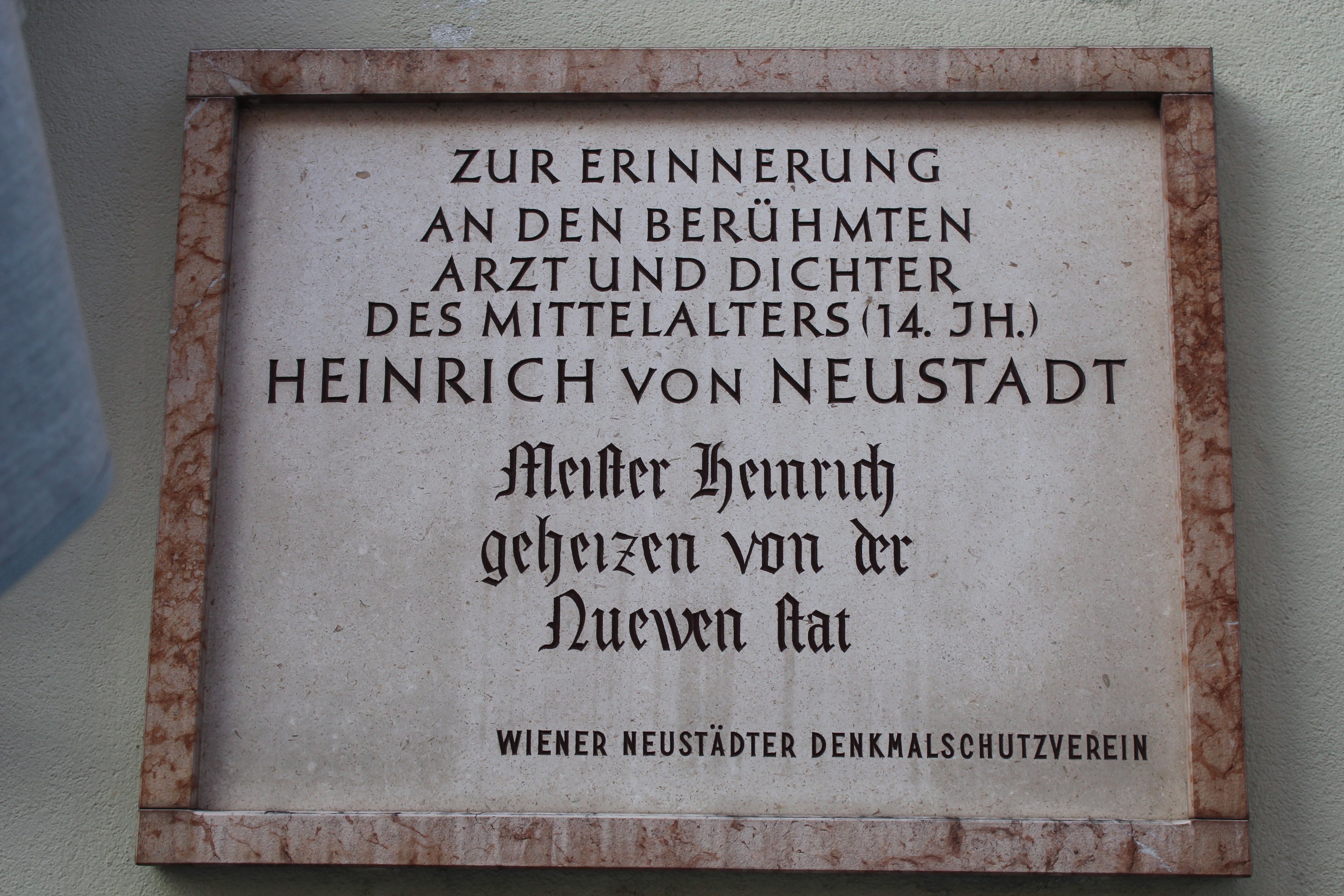 Rathaus, Gedenktafel an der Front zur Neukirchner Straße, Heinrich von Neustadt